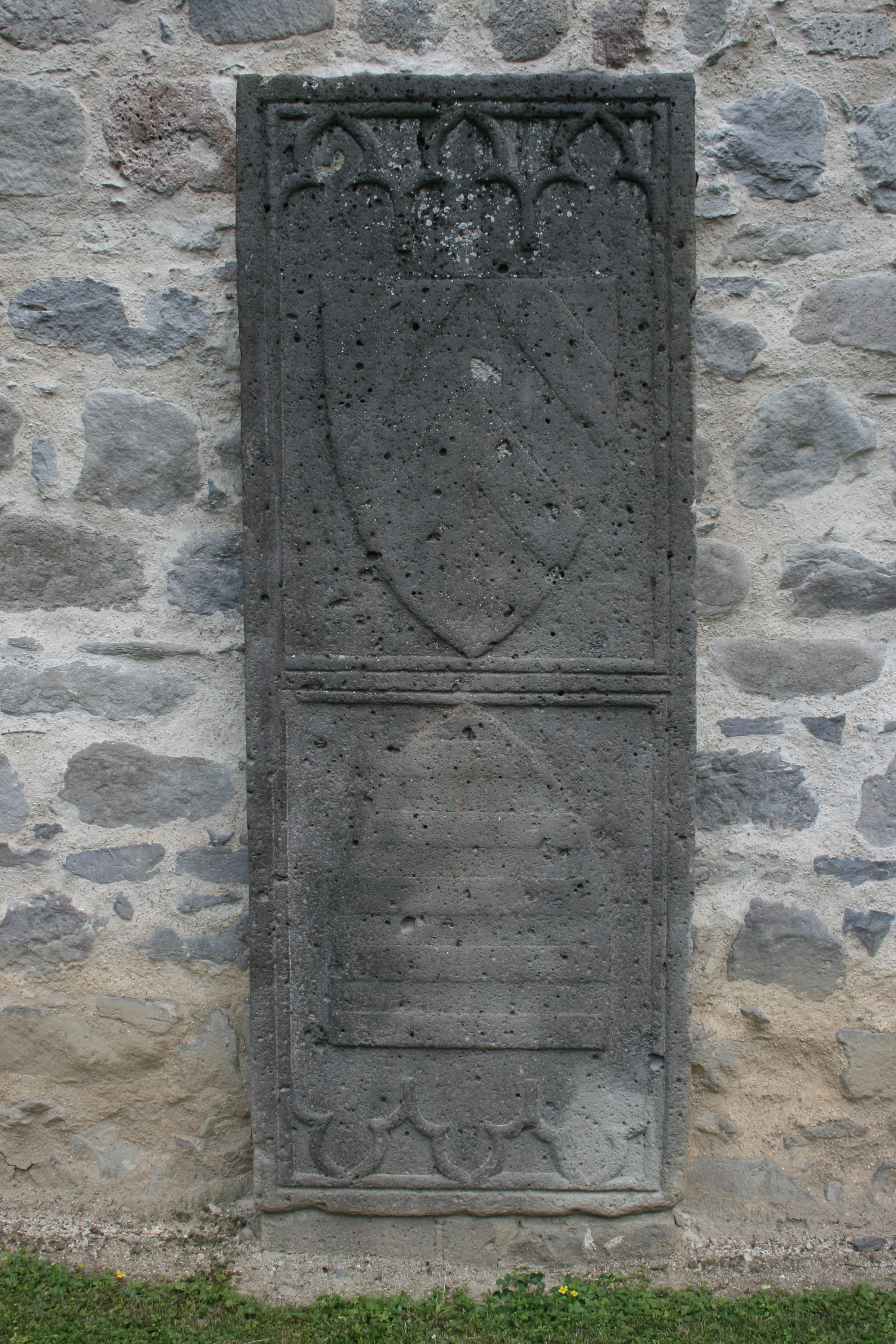 Grabplatte Elisabeths von Hanau (geb. von Rieneck) im Kreuzgang des Klosters Arnsburg.